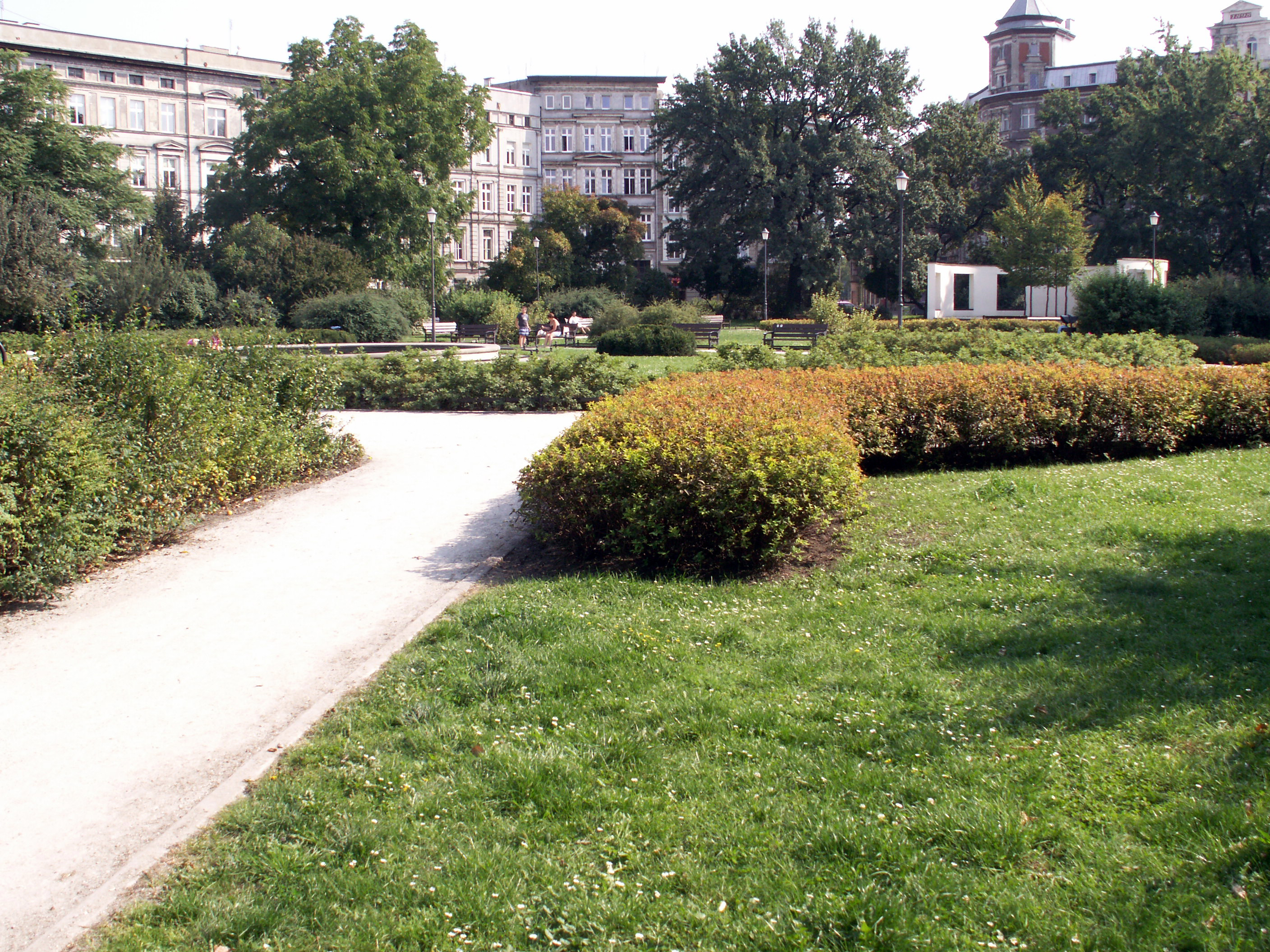 Wrocław, rejon placu św. Macieja (zespół urbanistyczny), 1873